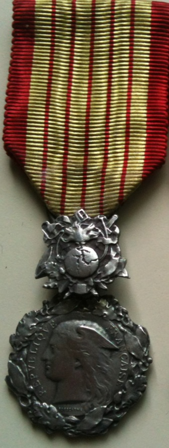 photo médaille d'honneur des douanes